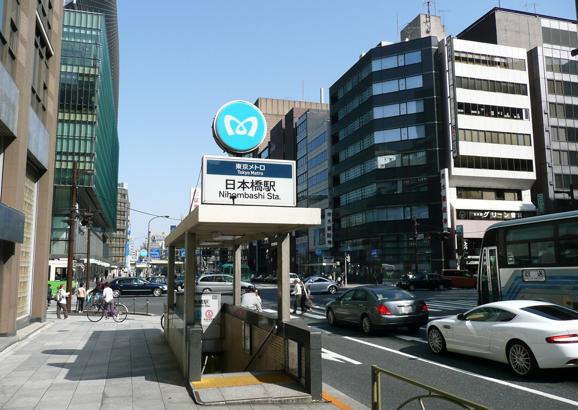 日本橋駅